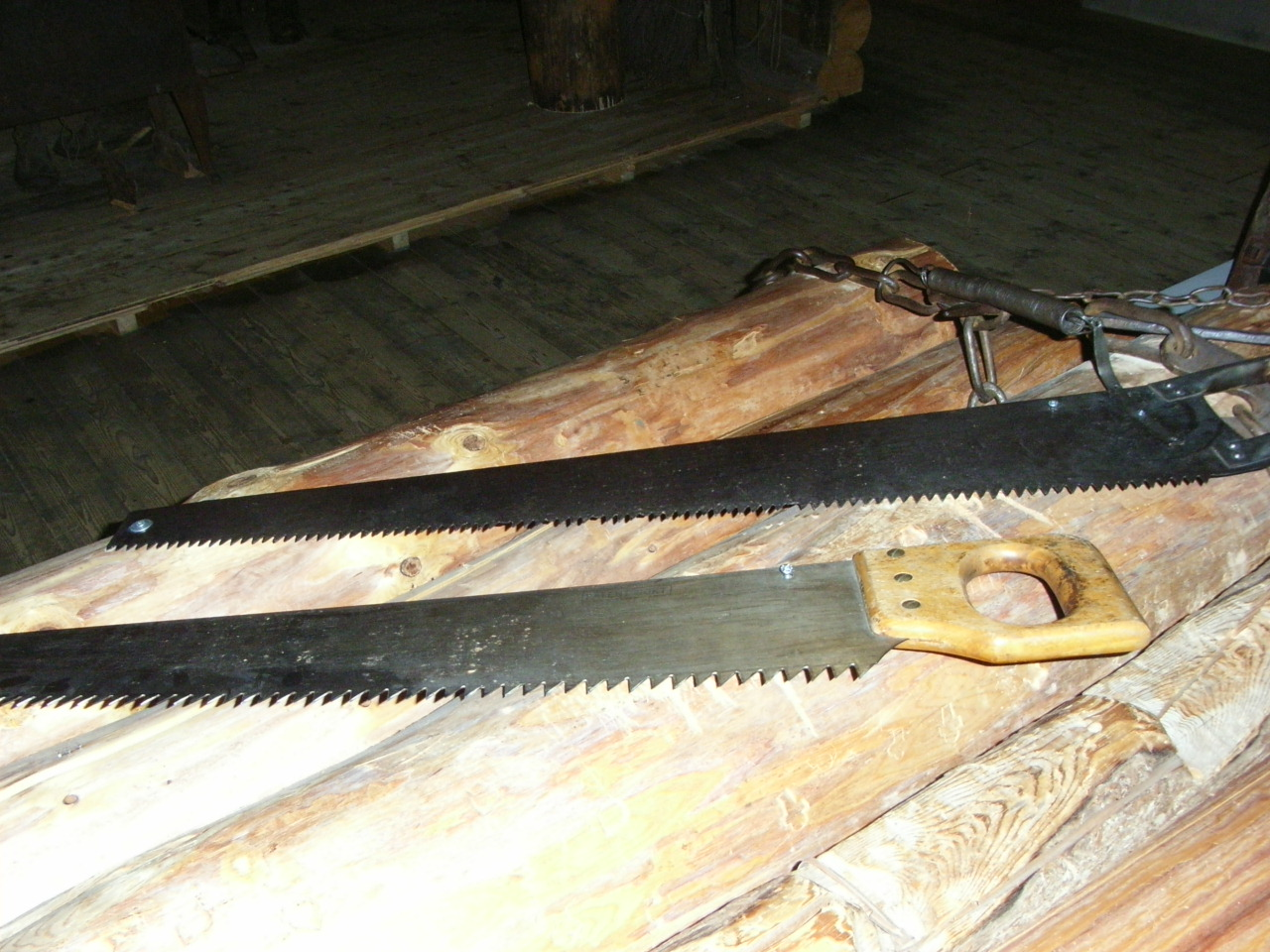 To svansar utstilte på Norsk skogmuseum på Elverum